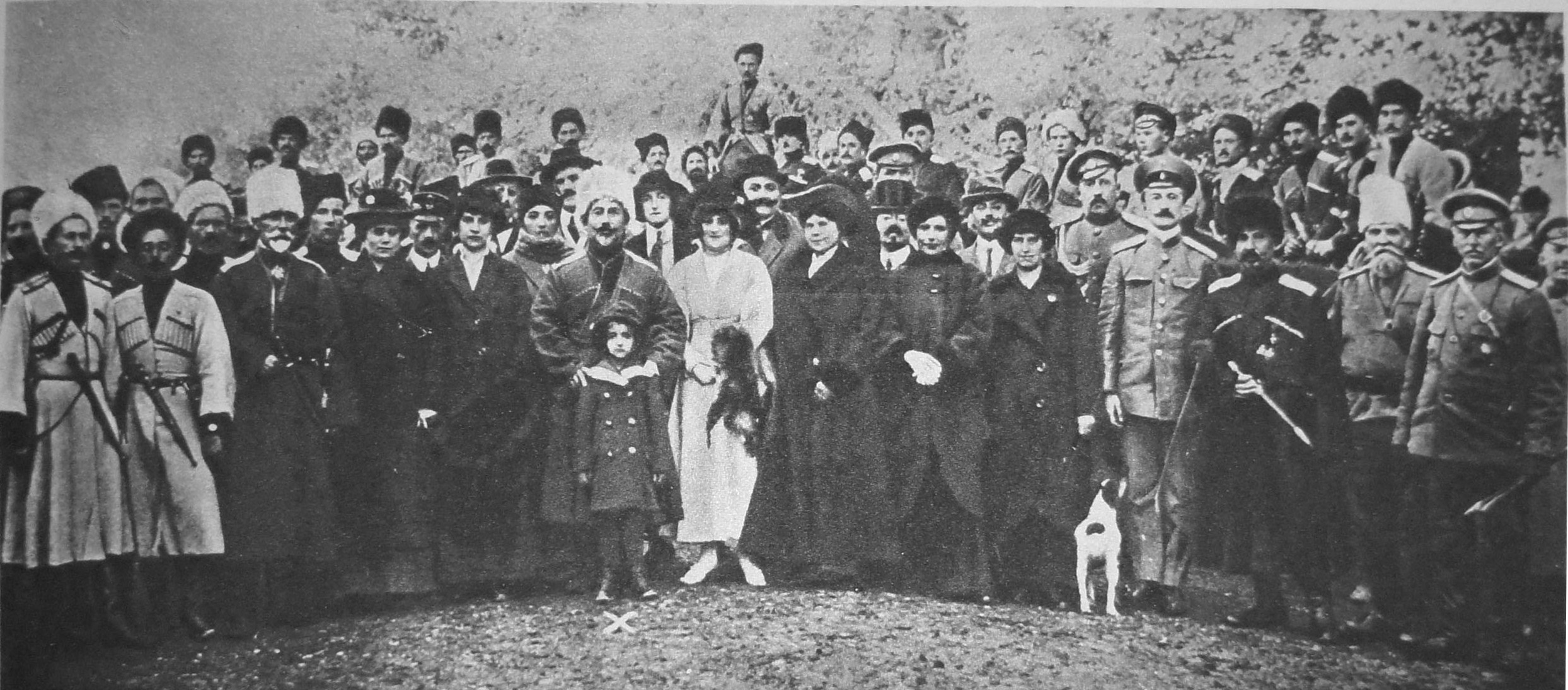 Le Miroir N°_127, page_15_le_général_Baratoff, au-dessus de la croix en photographie à Kazvin.